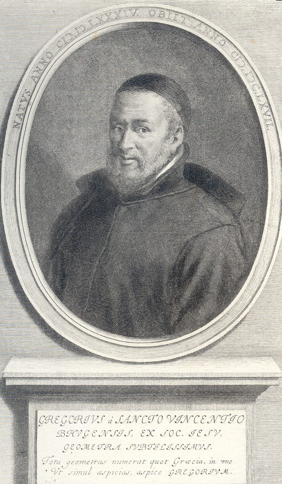 Ancienne gravure de Grégoire de Saint-Vincent